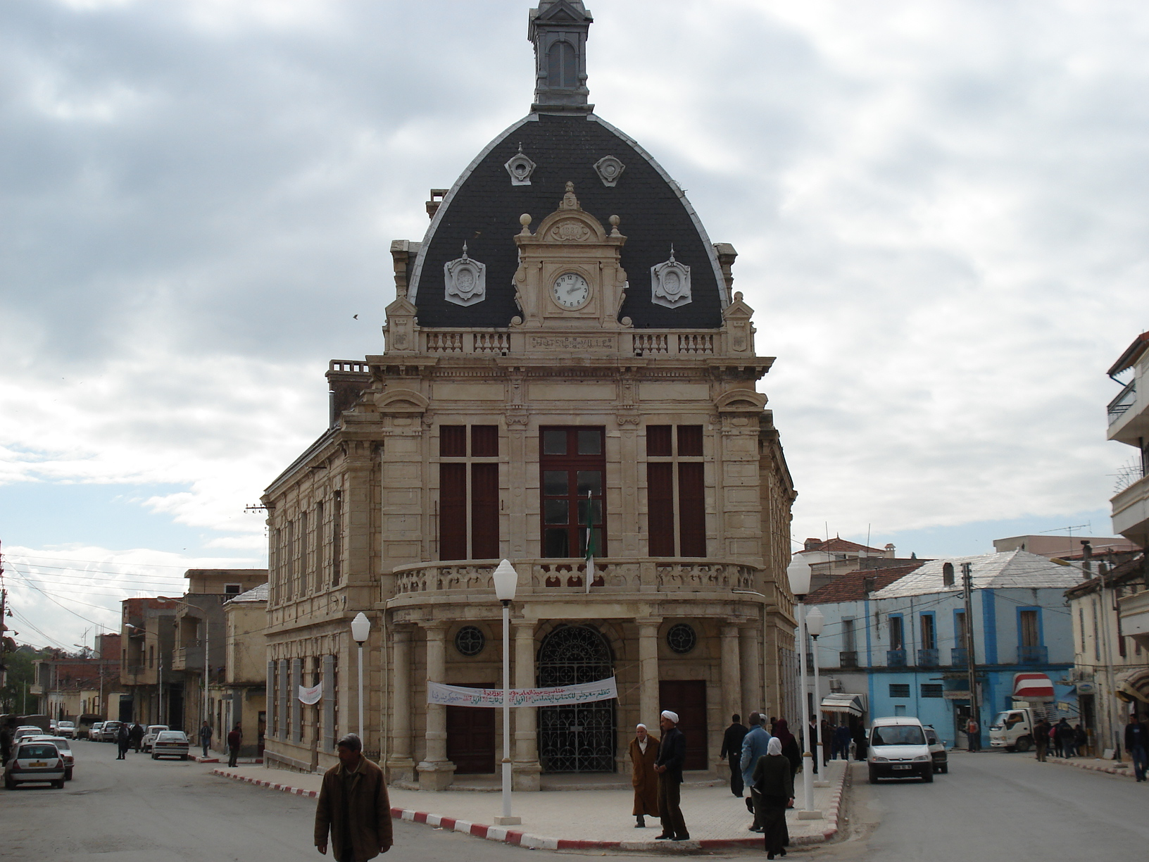 متحف مدينة سوق أهراس.